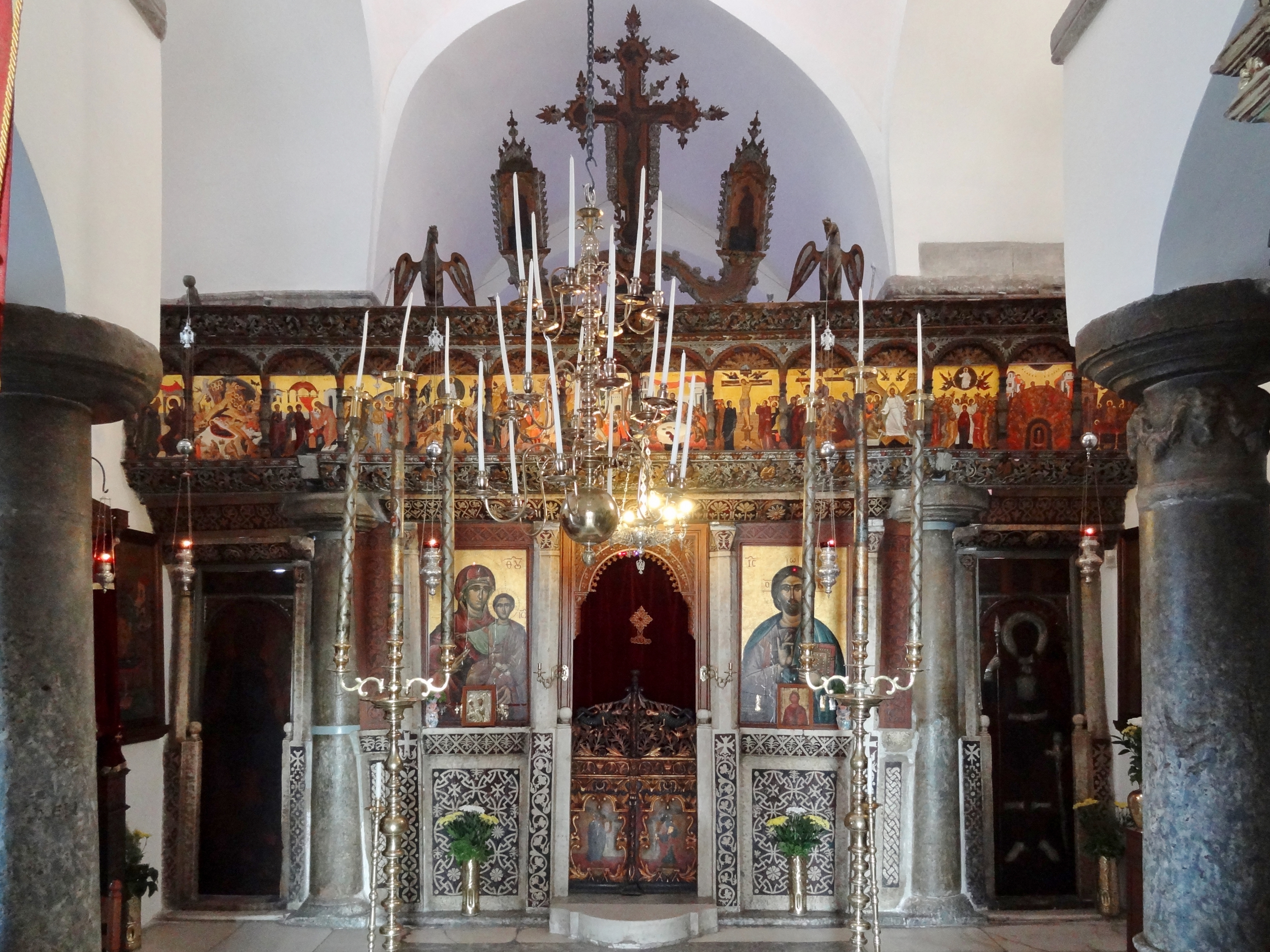 Ikonostase der Kirche Panagia Episkopi (Παναγία Επισκοπή) in Mesa Gonia, Santorin (Thera), Kykladen, Griechenland